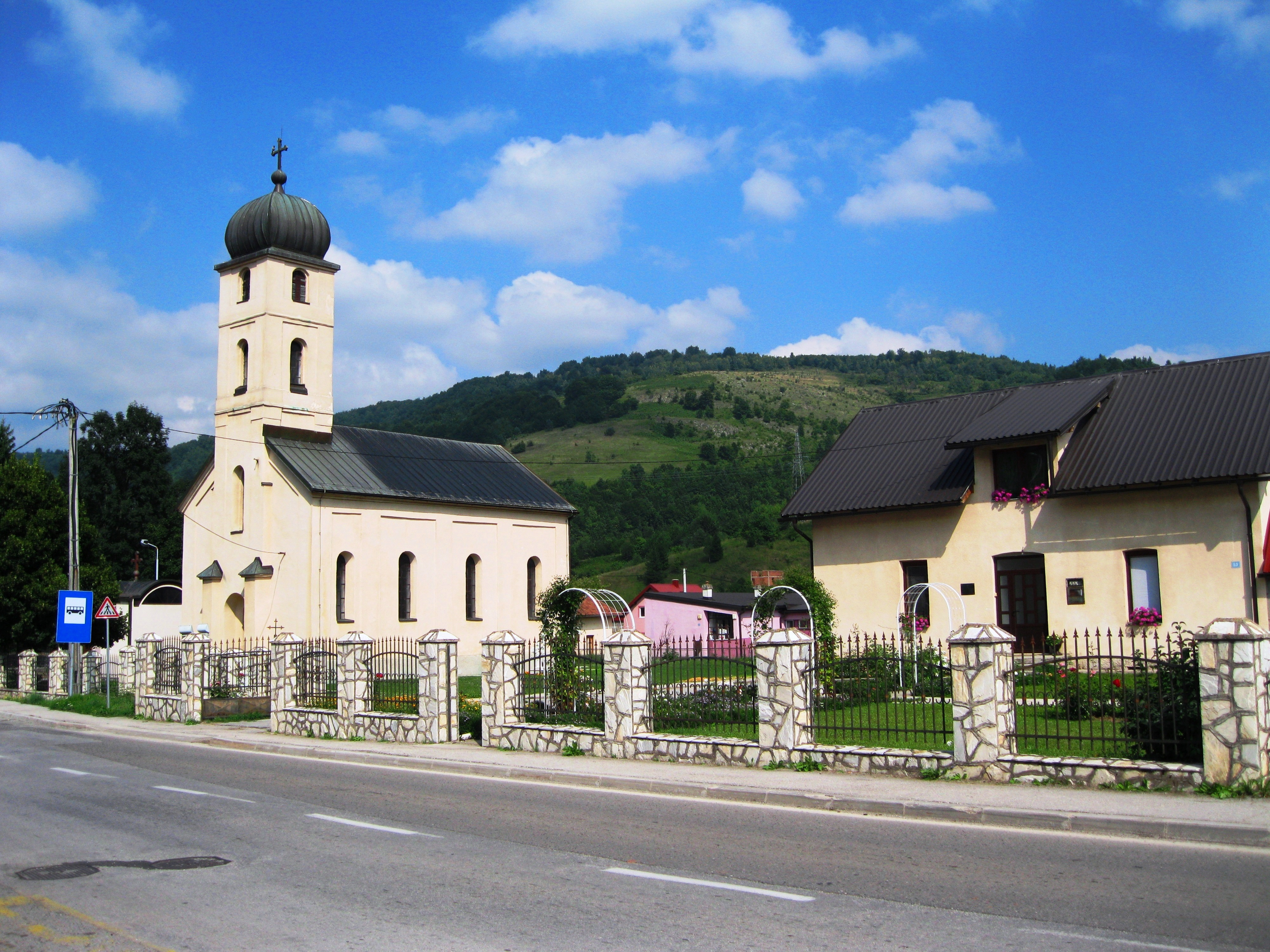 ЦРКВА У ТРНОВУ Посвећена Св. Великомученику Георгију, изграђена је 1886. године, а први свештеник у овој парохији је био Ристо Максимовић. Поред цркве, направљена је и парохијска кућа. Дијелом 19. и током 20.вијека црква је преживјела многе буре и олује, међу којима су два свјетска и један грађански рат. Љетопис цркве је изгорио, те нема података како се одвијао вјерски живот у Трнову током аустријске владавине. У току првог свјетског рата, црква је оштећена и однесена су звона. 1920. године извршене су оправке, а годину касније је постављено и звоно. Током 1943. године црква је оскрнављена, попаљена архива, поломљене иконе и уништен иконостас. По ослобођењу 1945. године, народ је кренуо из „пепела“ да обнавља своје светиње. Послијератни свештеник који је службовао, био је Драгољуб Јанковић. Црквени одбор са свештеником Јанковићем је кренуо у обнову богомоље. Изнутра је оправљена и окречена, спољашња фасада обновљена, постављена метална ограда и лимени кров. На мјесто предсједника црквеног одбора постављен је Божо Поповић. Нови радови на цркви су започели 1976., јер је годину дана прије народ са црквеним одбором одлучио да замијени лимени кров бакарним, затим куполу и да подигне звоник у висину за 3 метра. У том периоду свештеничку дужност вршио је Недељко Поповић са љубављу као прави Христов пастир и у складу своје пастирске заклетве, због чега је био омиљен у народу. Почетком рата 1992. године је страдао, а црква и парохијски дом су запаљени. Од 1996.—1999. године црква и дом су обновљени вољом народа и са свештеником Чедом Ђуреиновићем, те донаторским и другим средствима. Црква је освештана 3. октобра 1999. године са благословом Његовог Високопреосвештенства Митрополита дабробосанског господина Николаја. Службу у овој цркви данас обавља јереј Младен Микавица .